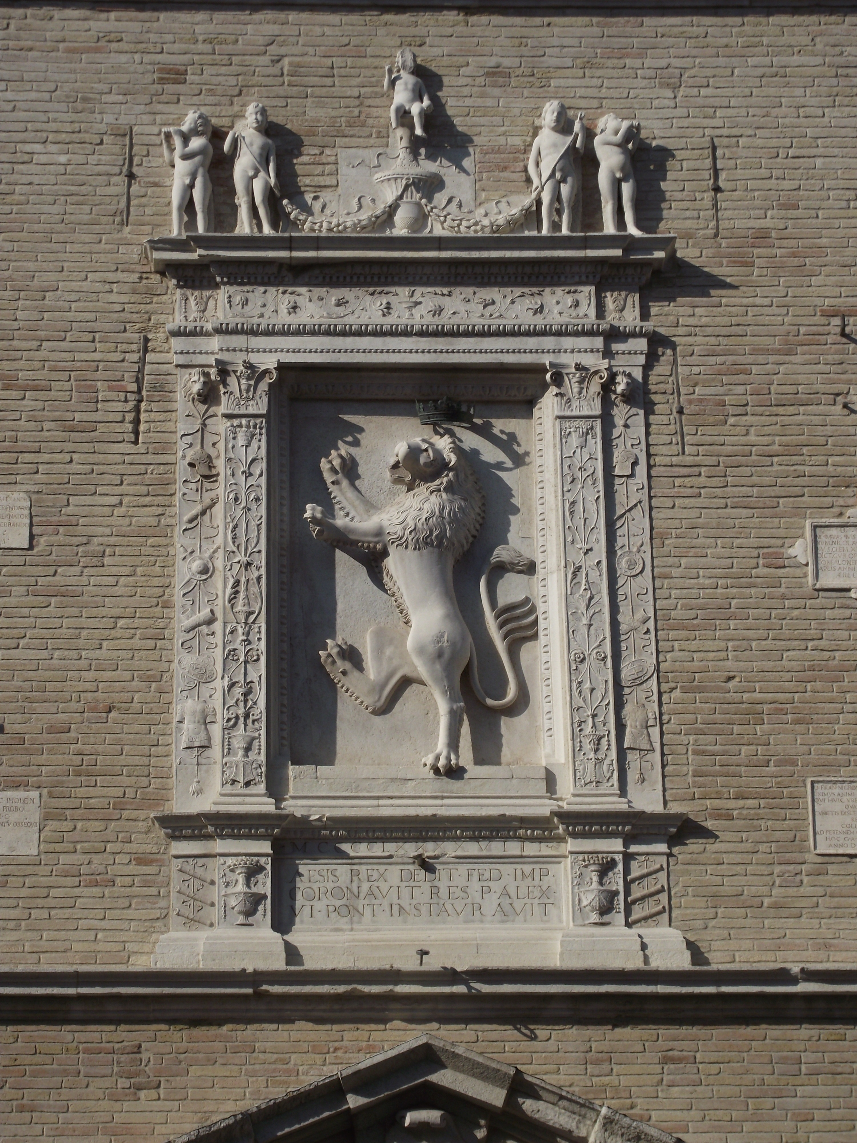 Jesi, Palazzo della Signoria, F.di G.Martini, 1486-98